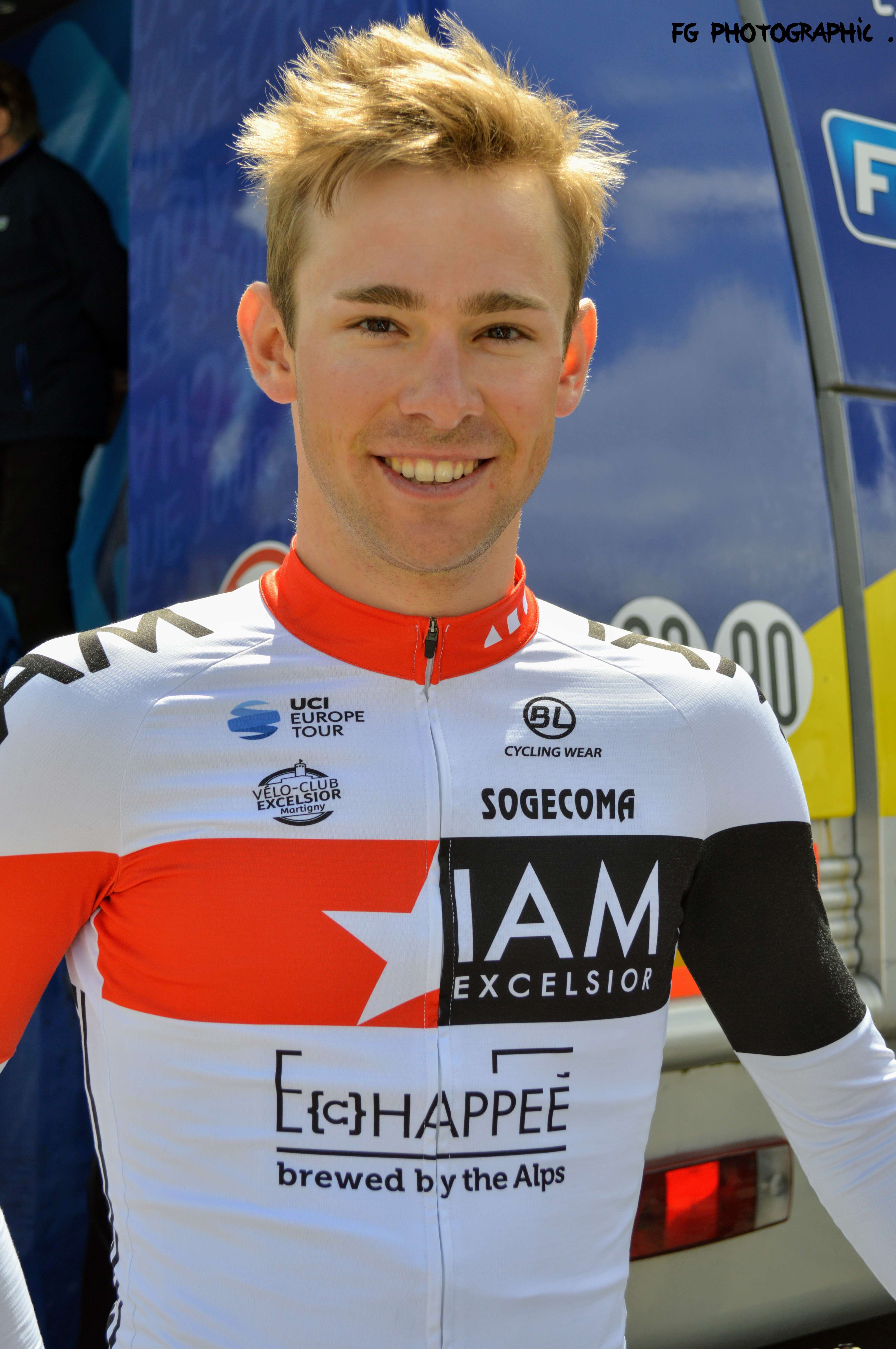 Fabian LIEHNARD - Juin 2019